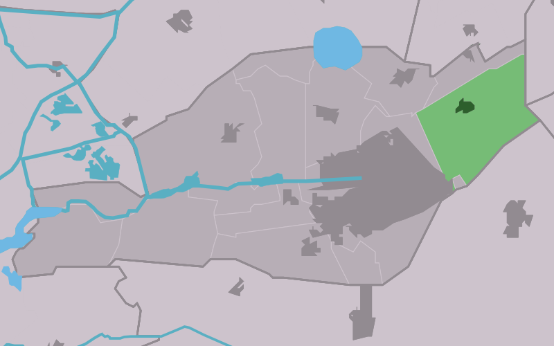 Kaartsje fan himrik fan Drachster Kompenije